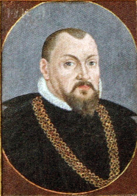 Bildnis von Markgraf Johann von Brandenburg-Küstrin aus einem Kabinettschrank mit 14 fürstlichen Portraits.